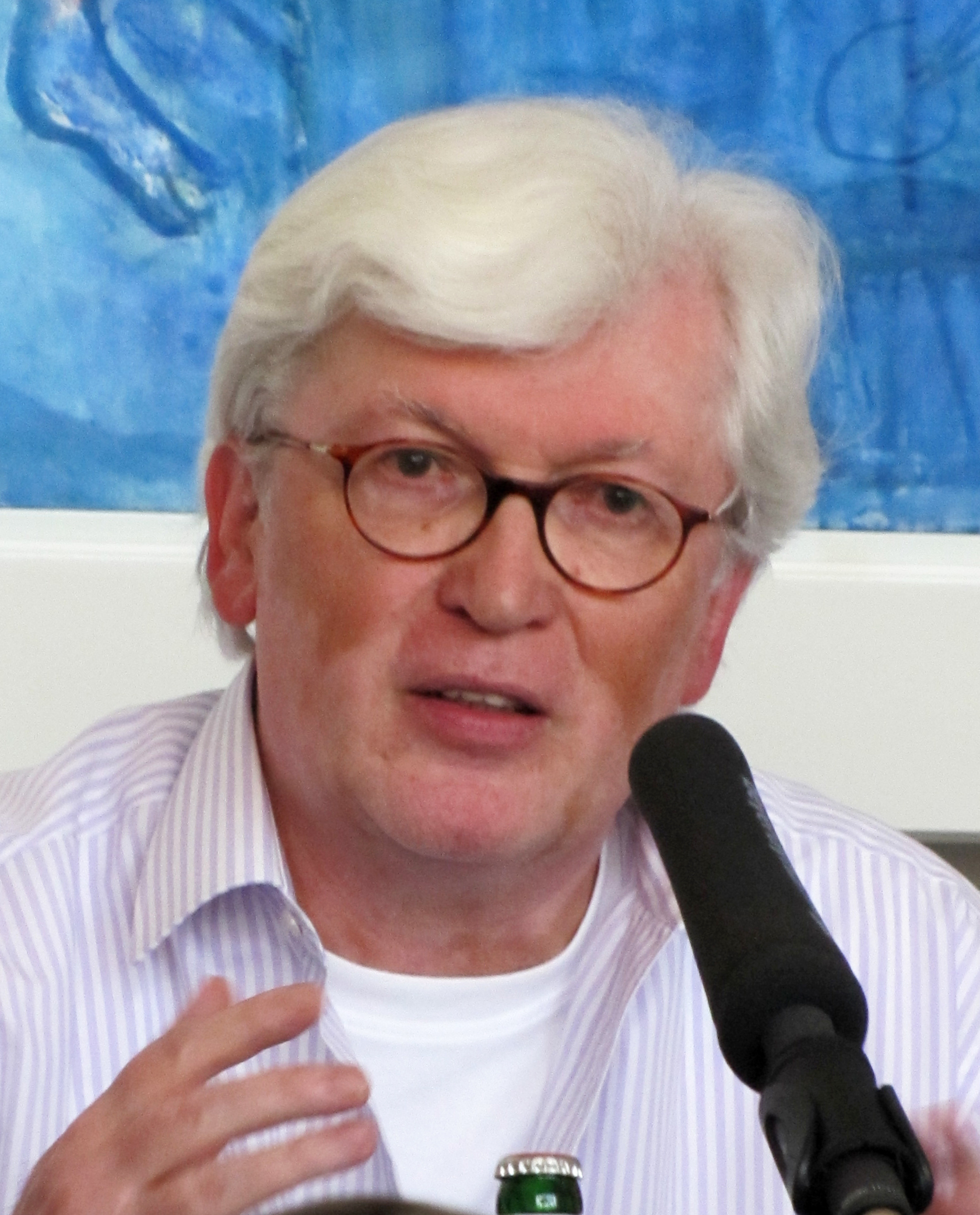 Wolfgang Kraushaar, 2012 bei den Roemerberggespraechen in Ffm.